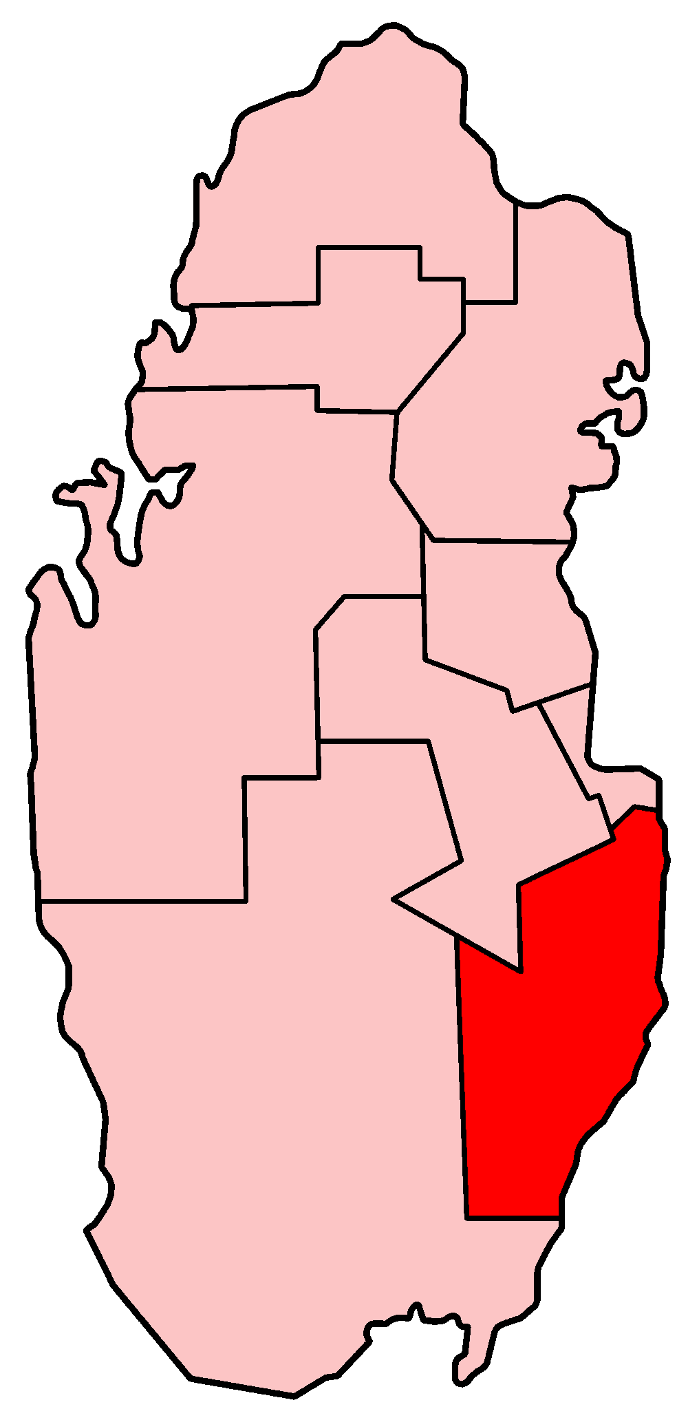 Situación de Al Wakrah en Qatar. Map of Qatar showing Al Wakrah governorate. Made by User:Golbez.